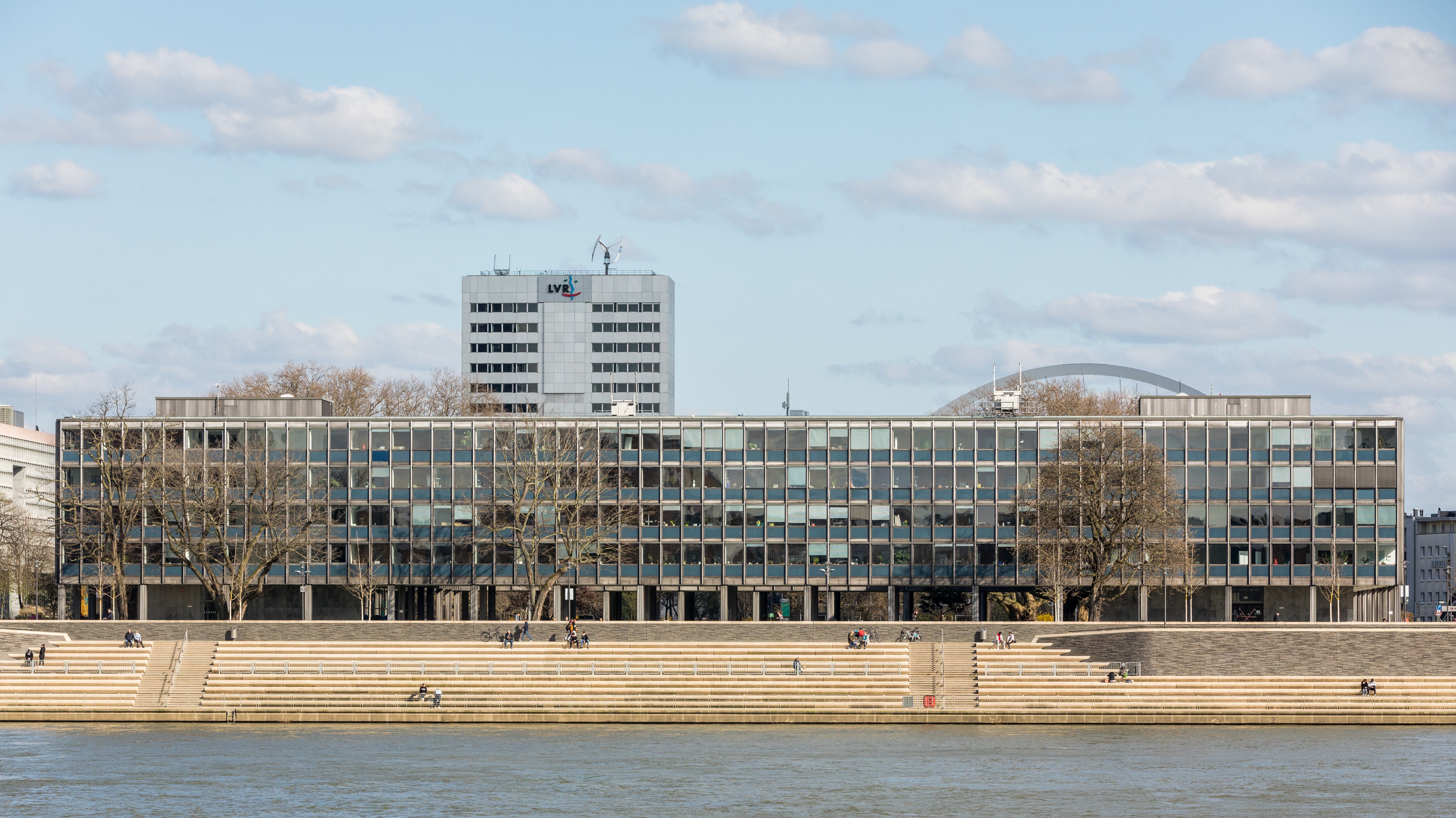 Landeshaus des LVR. Im Vordergrund ein Teil des Rheinboulevards Köln-Deutz